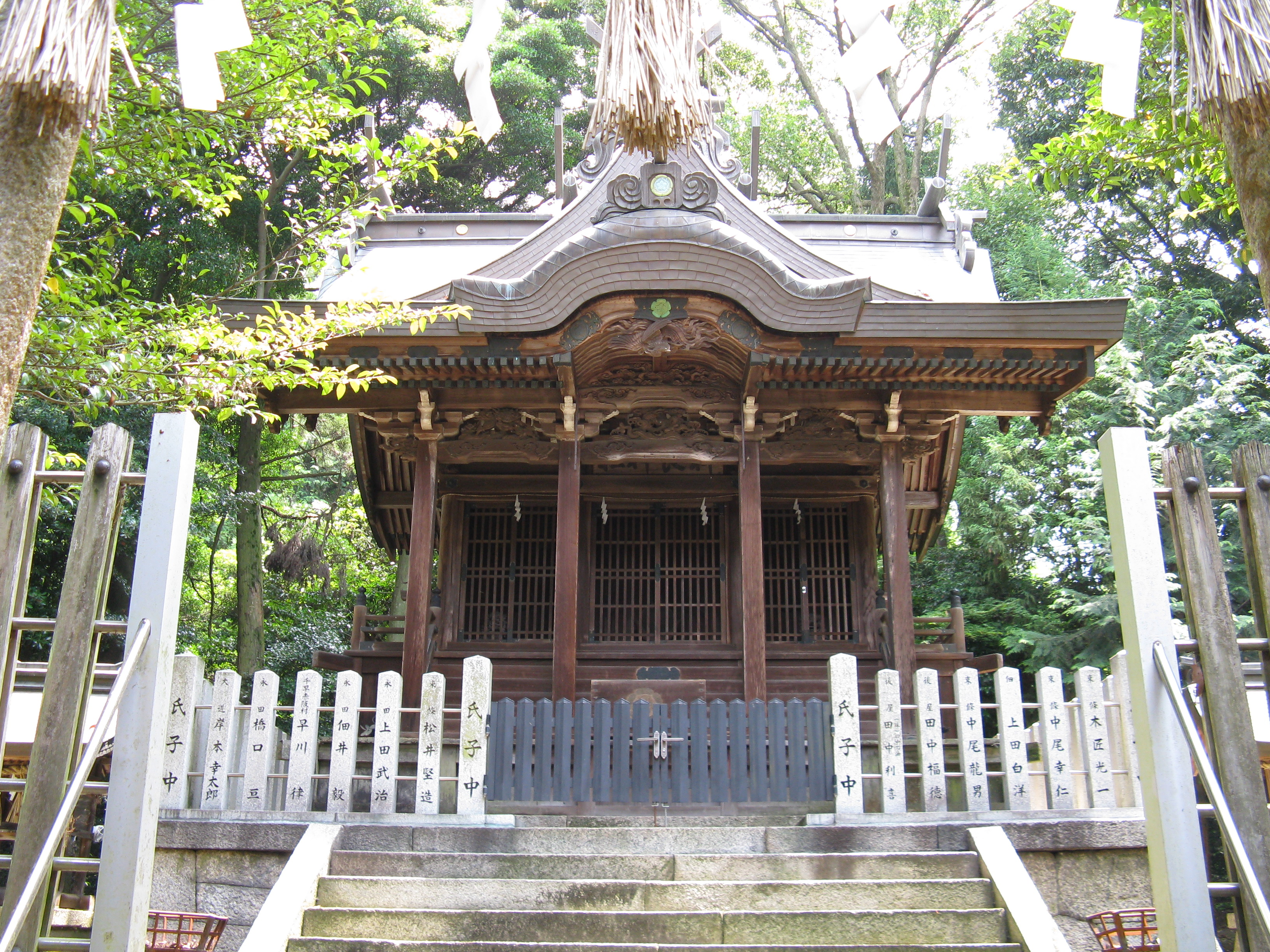 科長神社 本殿